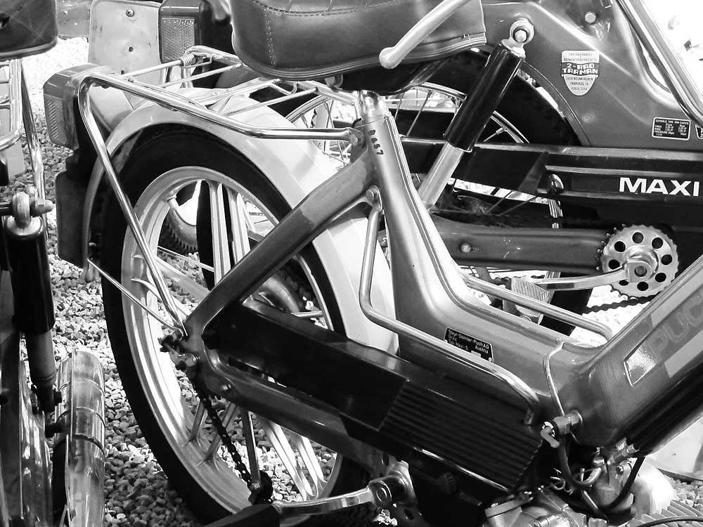 Starres Rahmenheck des Puch Maxi